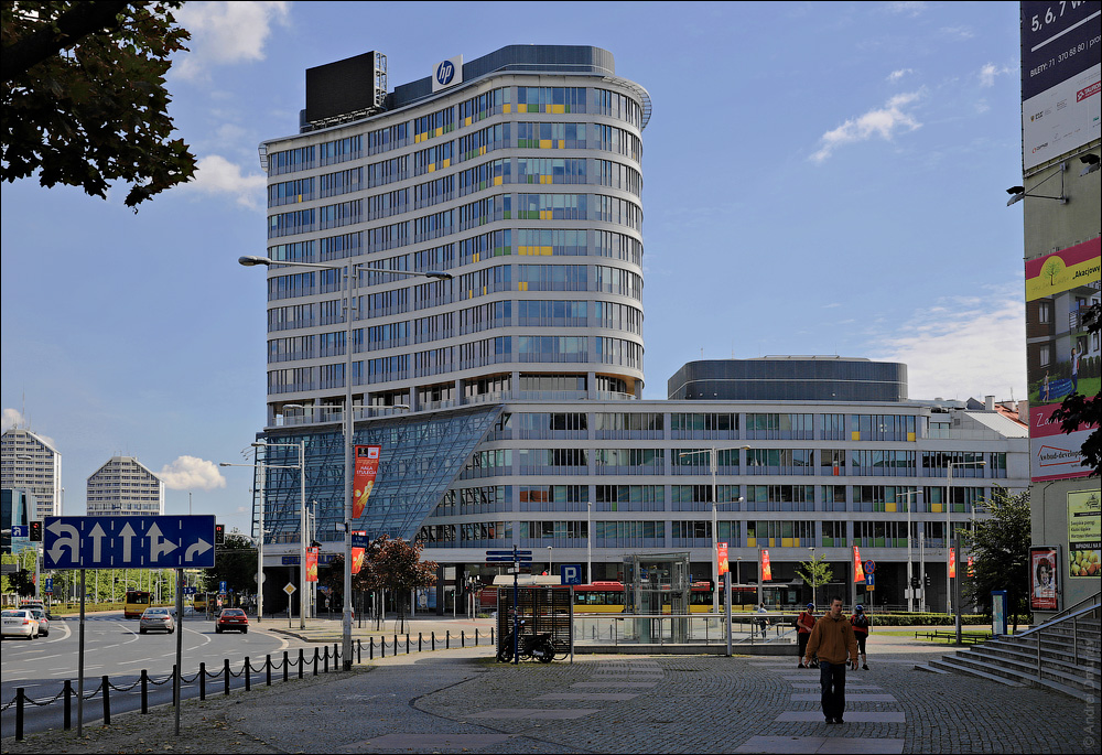 Уроцлаўскія замалёўкі